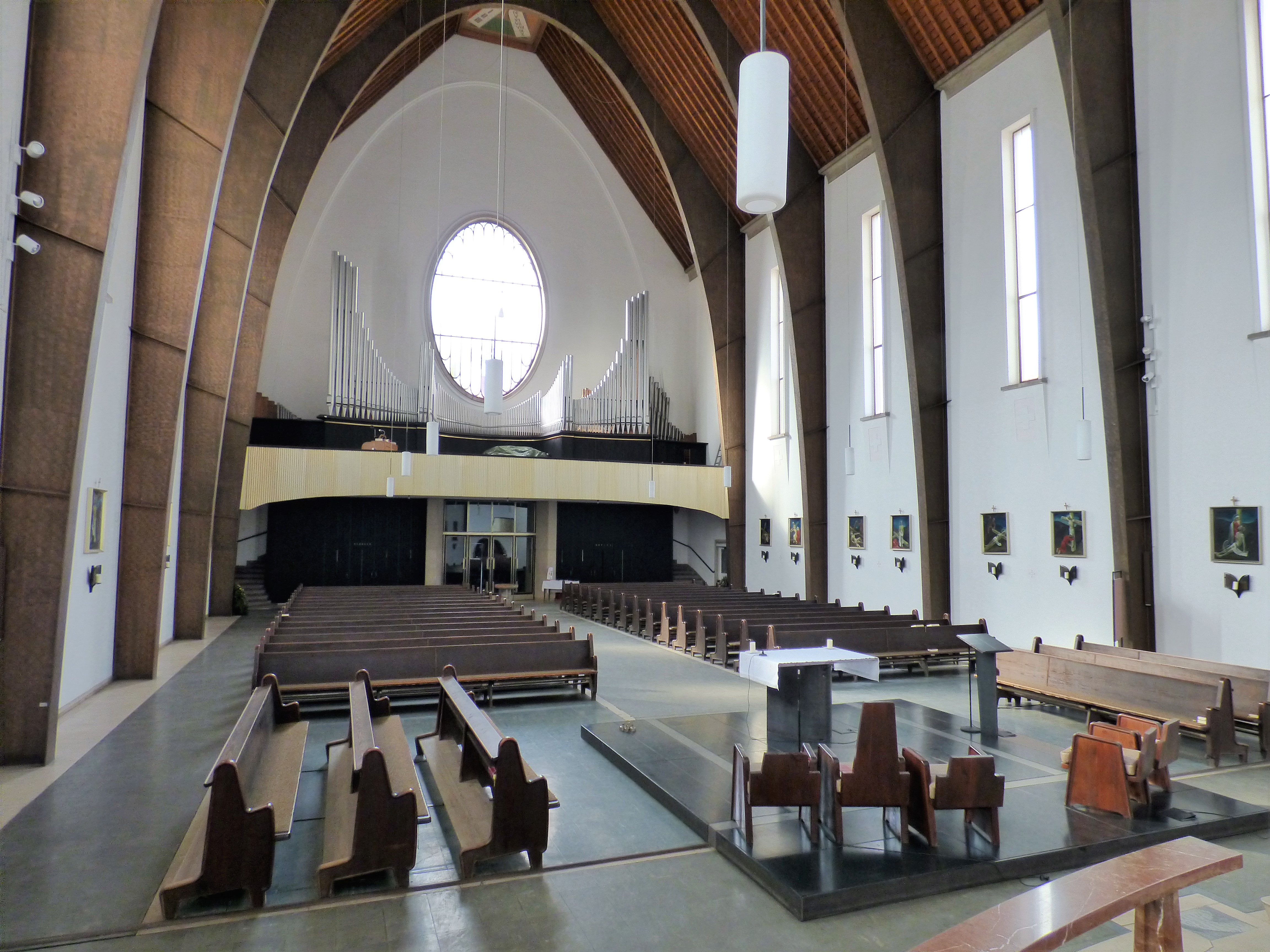 Pfarrkirche Donawitz (Steiermark) innen